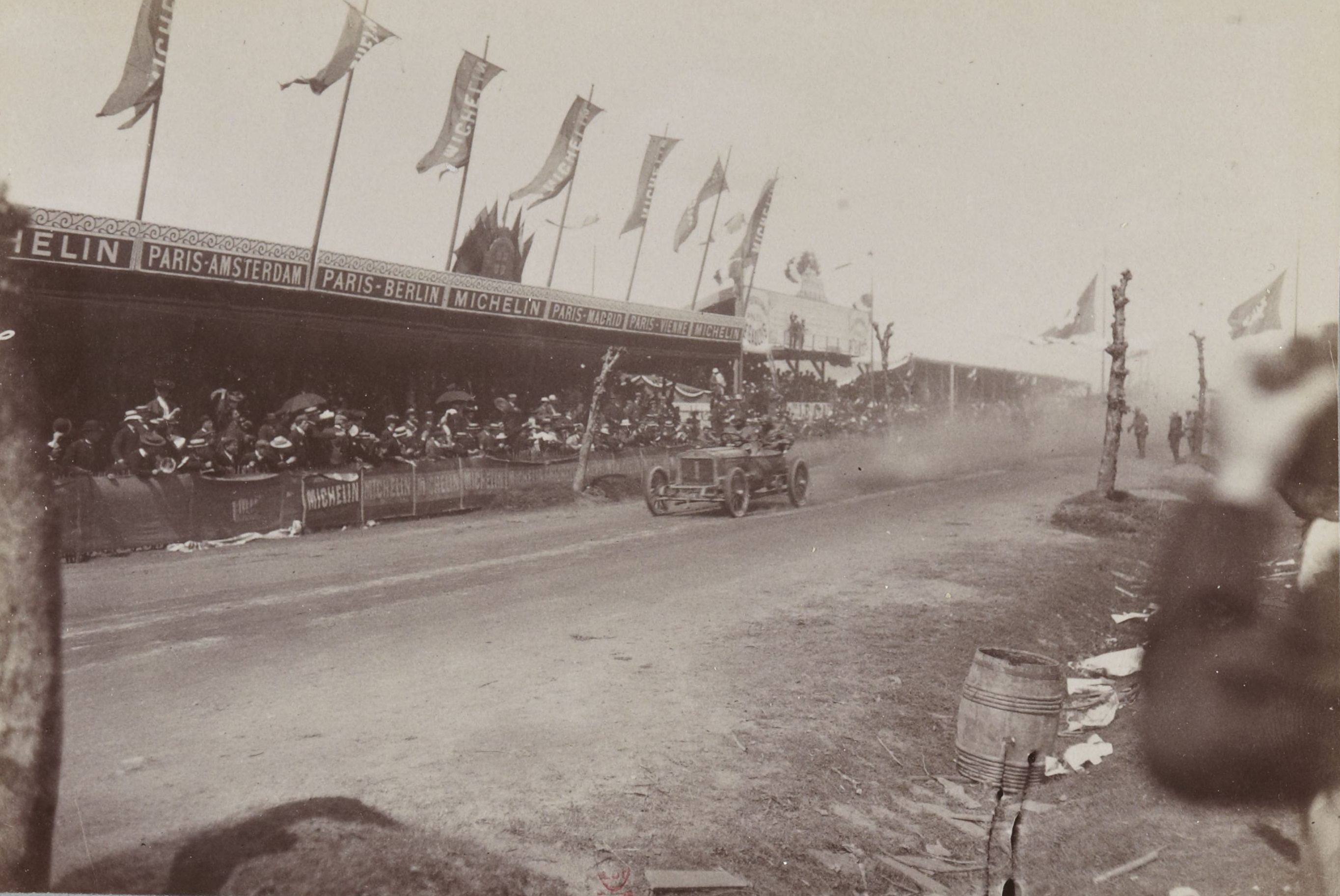 [Collection Jules Beau. Photographie sportive] : T. 30. AnnÃ©e 1905 / Jules Beau : F. 21. [Coupe Gordon Bennett, Laschamps, 16 juin 1905]